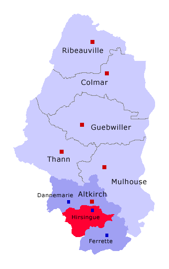 Lage von Kanton Hirsingue im Arrondissement Altkirch und im Département Haut-Rhin Selbst erstellt von Benutzer: Jeanfrance Mai 2006